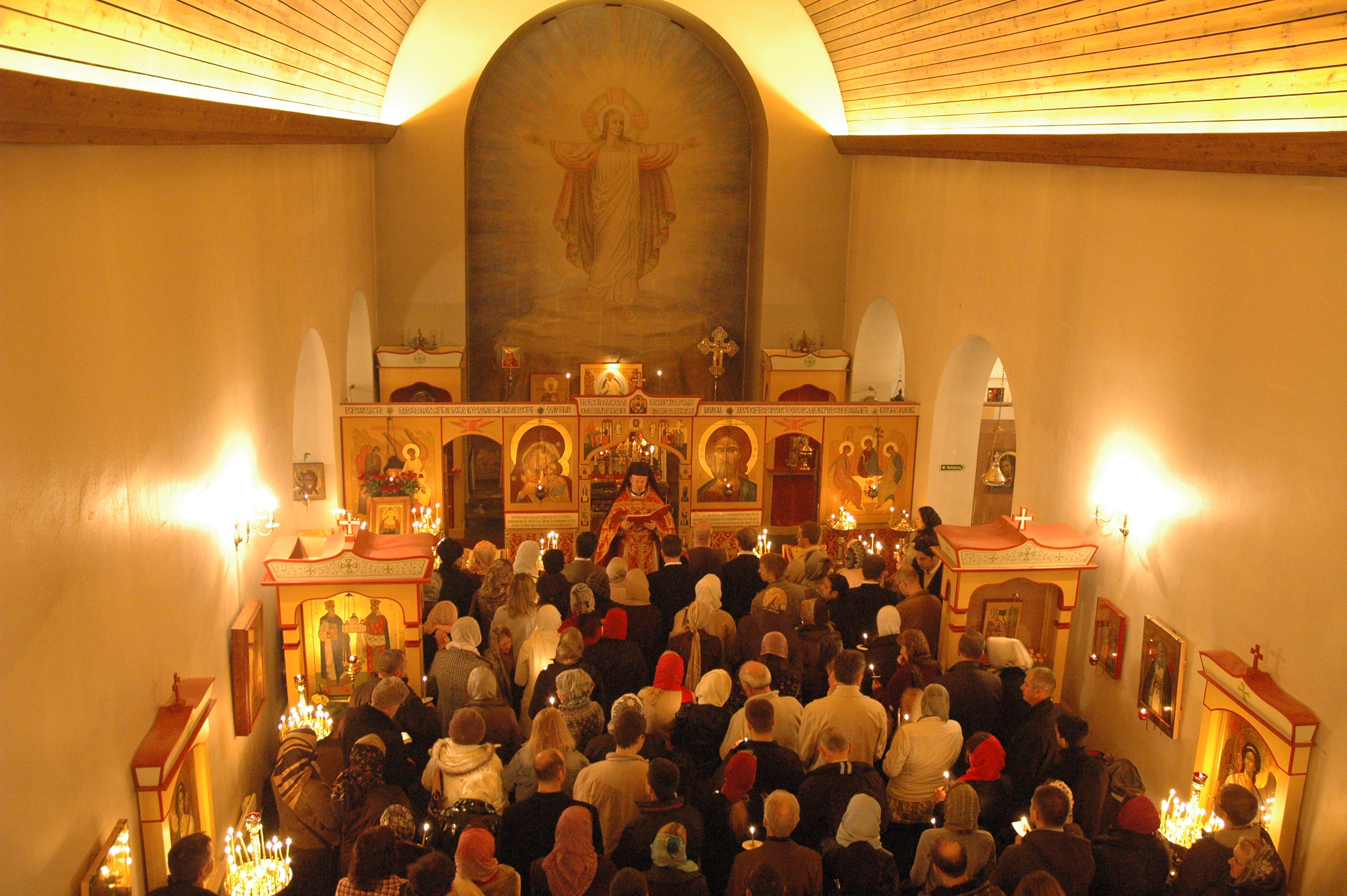 Den apostel-like fyrstinne hellige Olga menighet